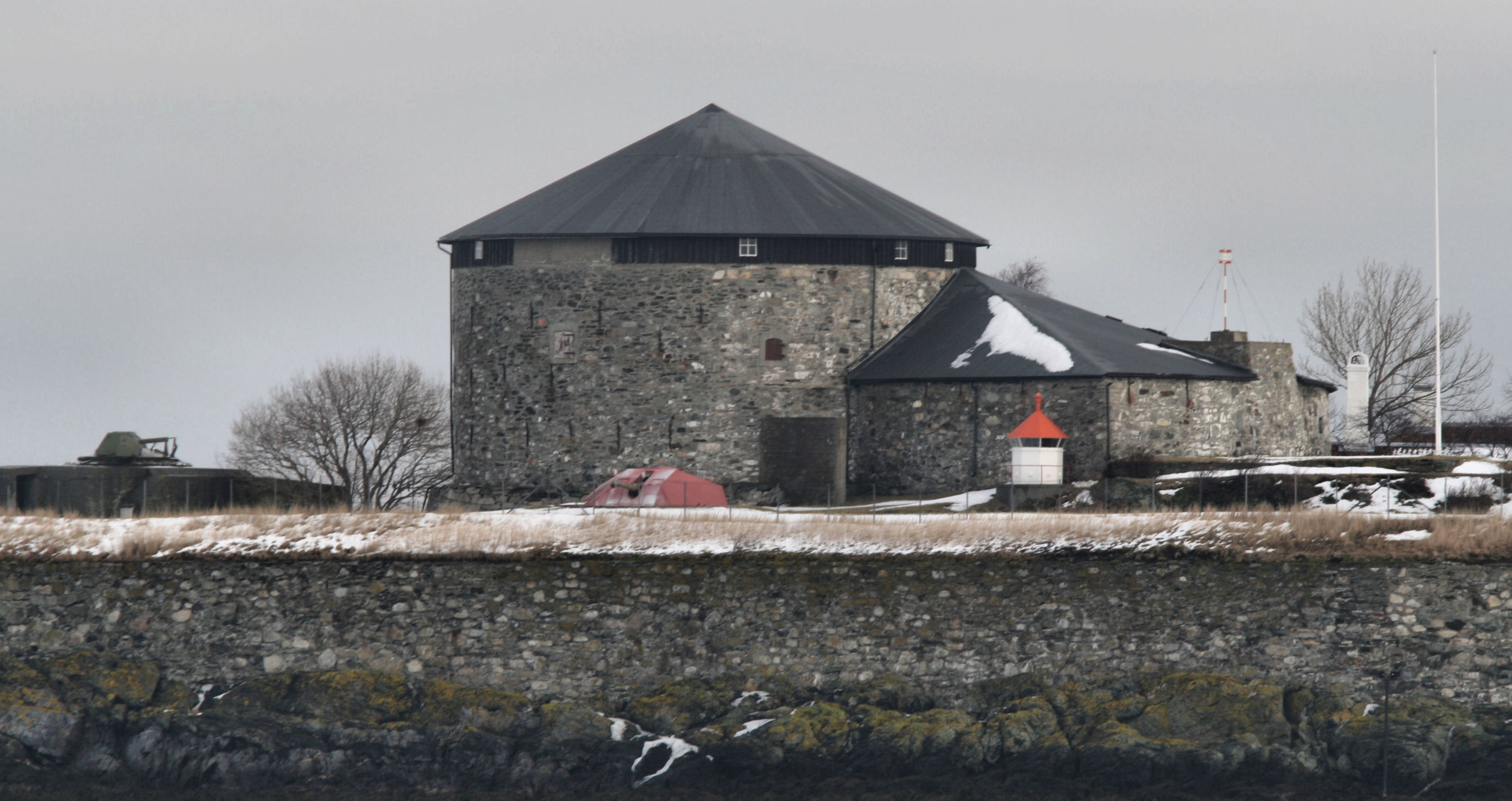 Munkholmen fortress, Trondheim, Norway